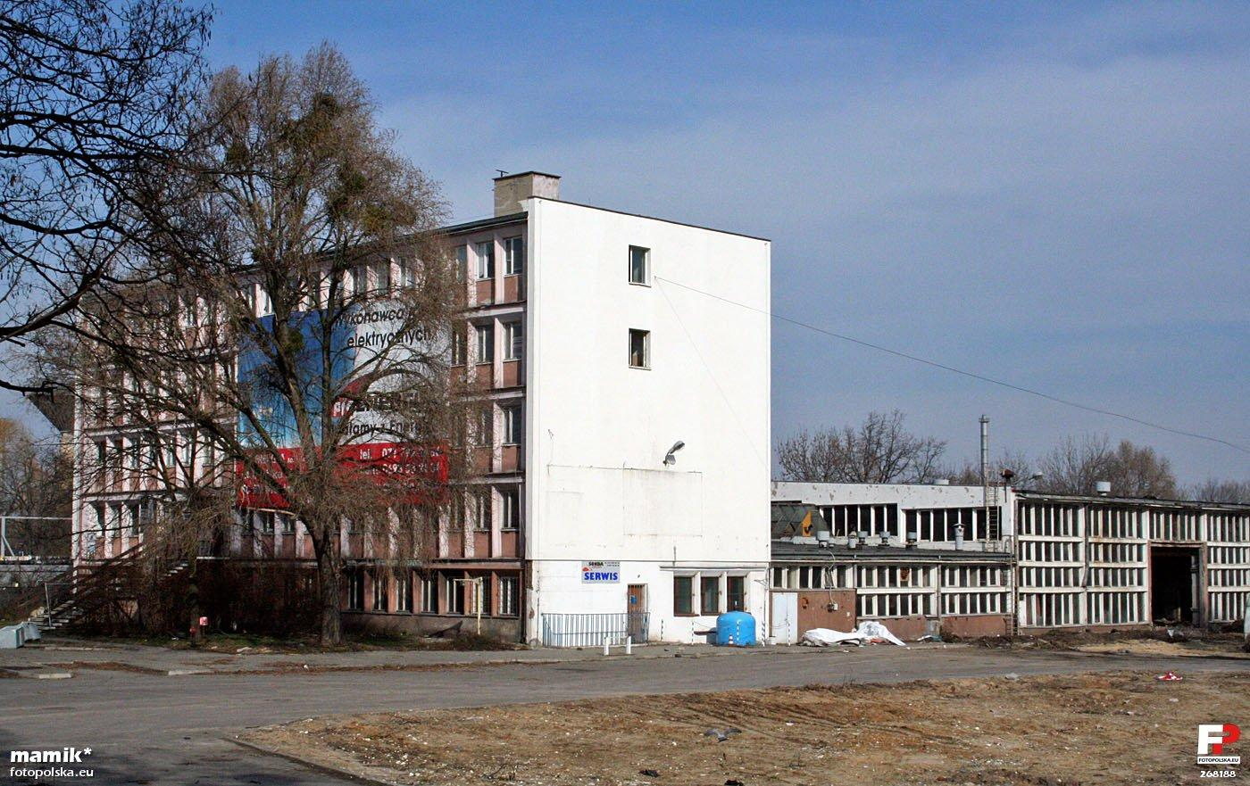 Na terenie obecnie zajmowanym przez Corte Verona stał biurowiec i hala magazynowa Wrocławskiego Przedsiębiorstwa Budownictwa nr 2 WROBIS S.A. - Zakład Sprzętu i Transportu, wyburzono je w marcu 2007 r. Widok z Alei Pracy. W poprzednicjh latach w tym miejscu siedzibę miał wrocławski Transbud